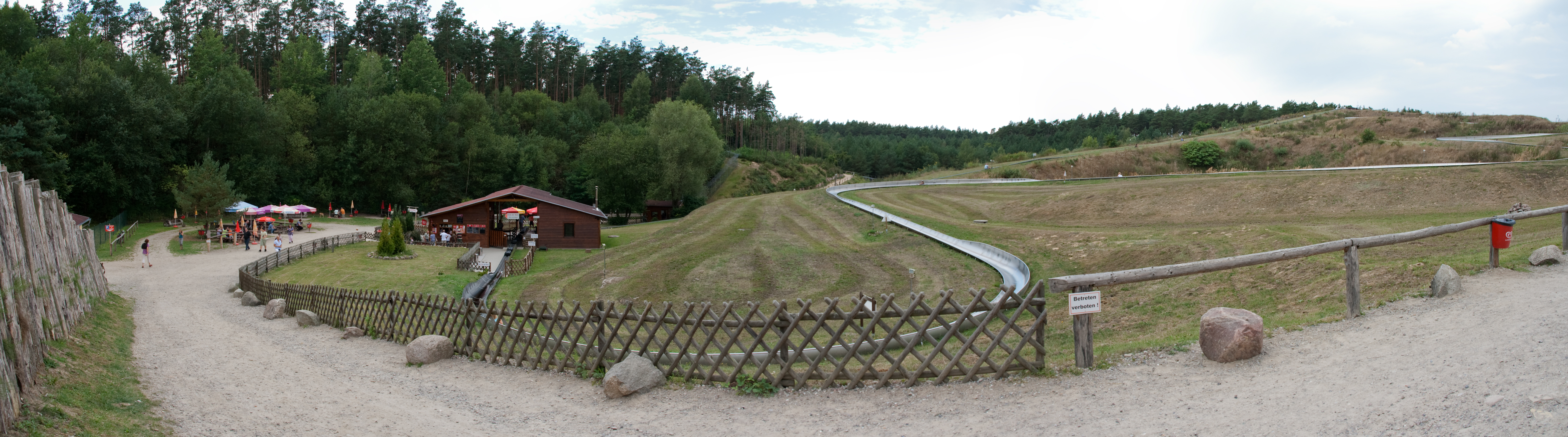 Sommerrodelbahn mit dem im Hintergrund (links) befindlichen Affenwald.